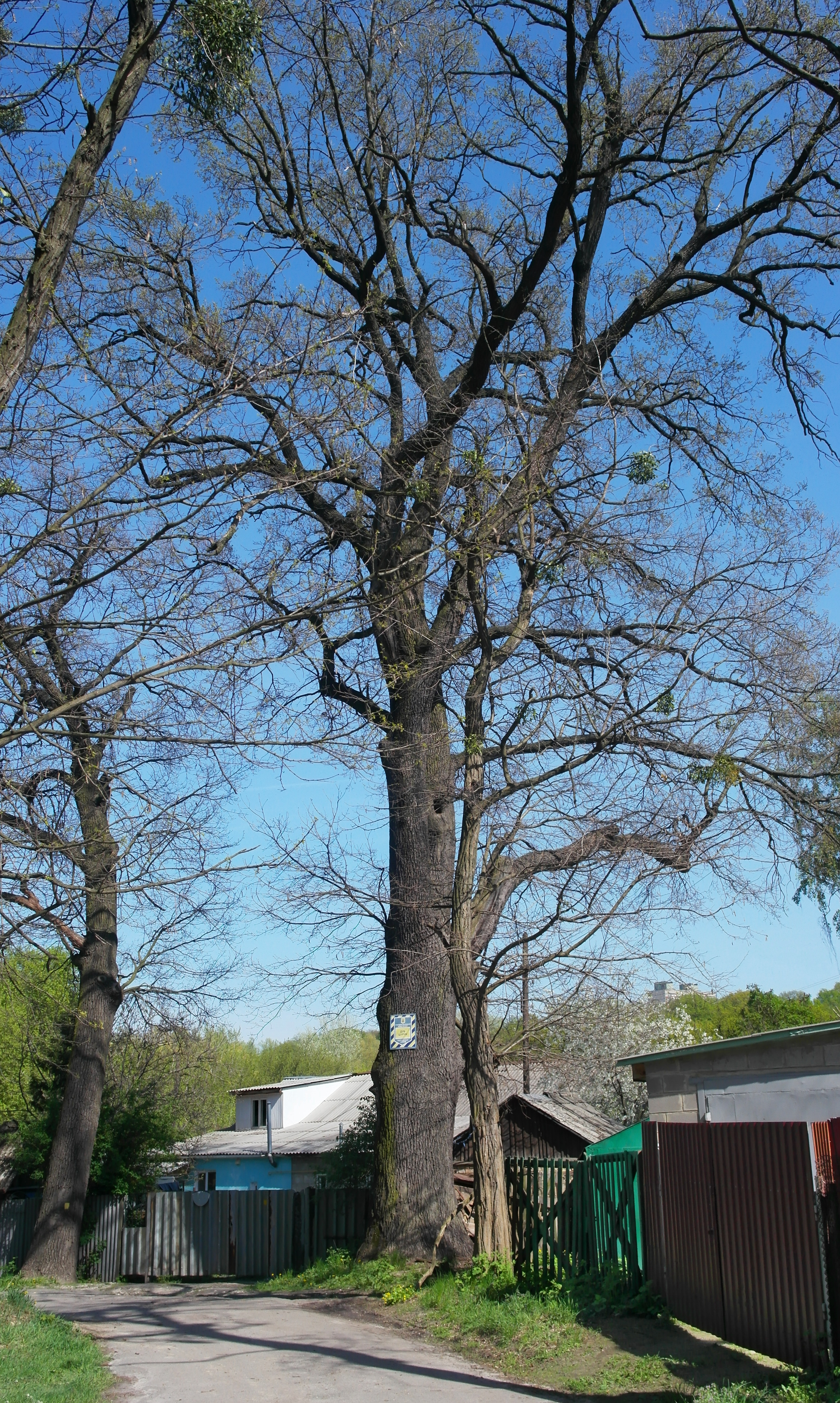 Подільський район, вул. Тираспольська, 2. Київський еколого-культурний центр